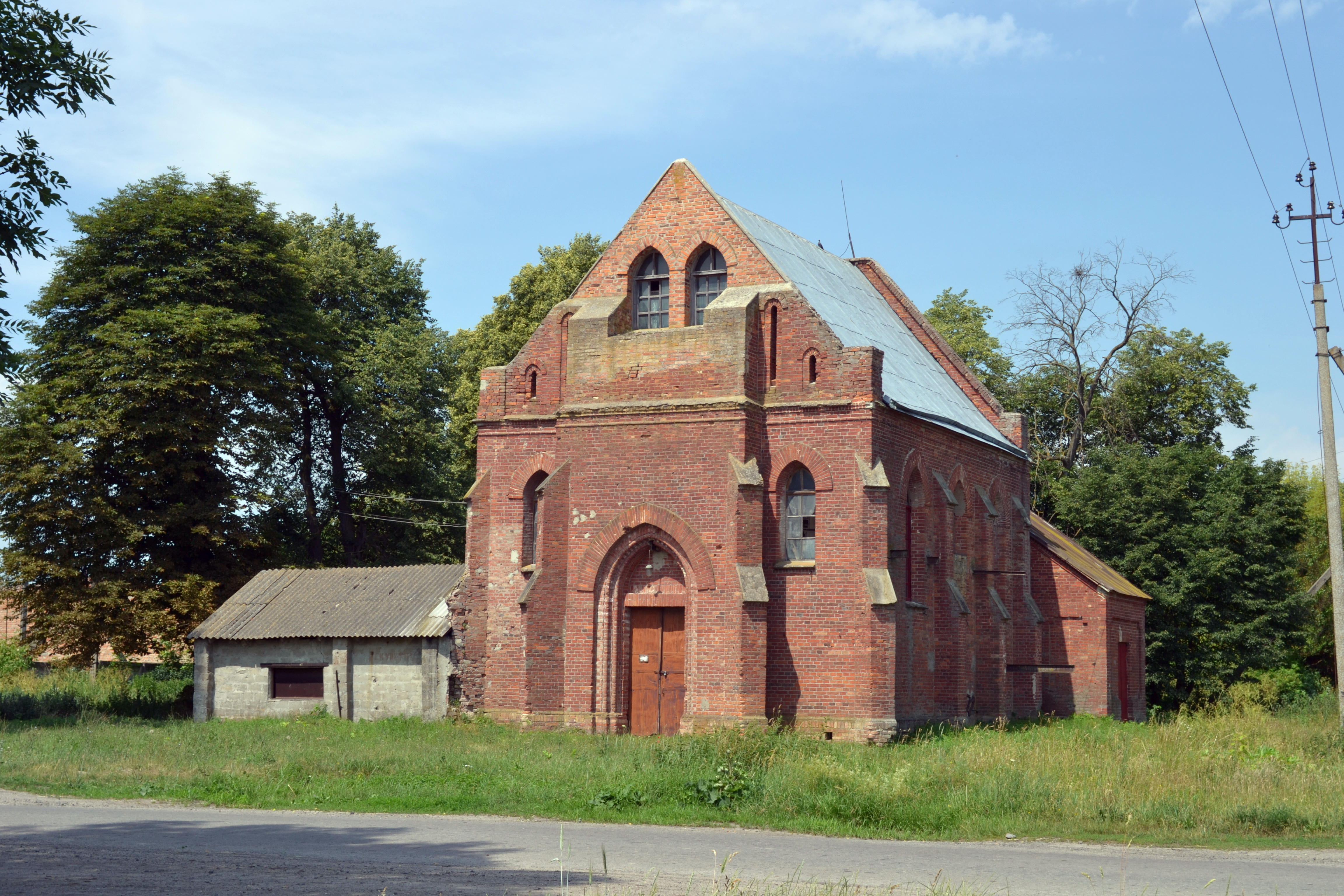 Костел (мур.) (1900 рік) - вигляд з північного сходу - Купичів Турійський район Волинська область Україна